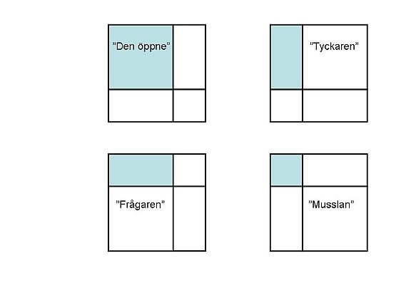 Johari kommunikationsstilar